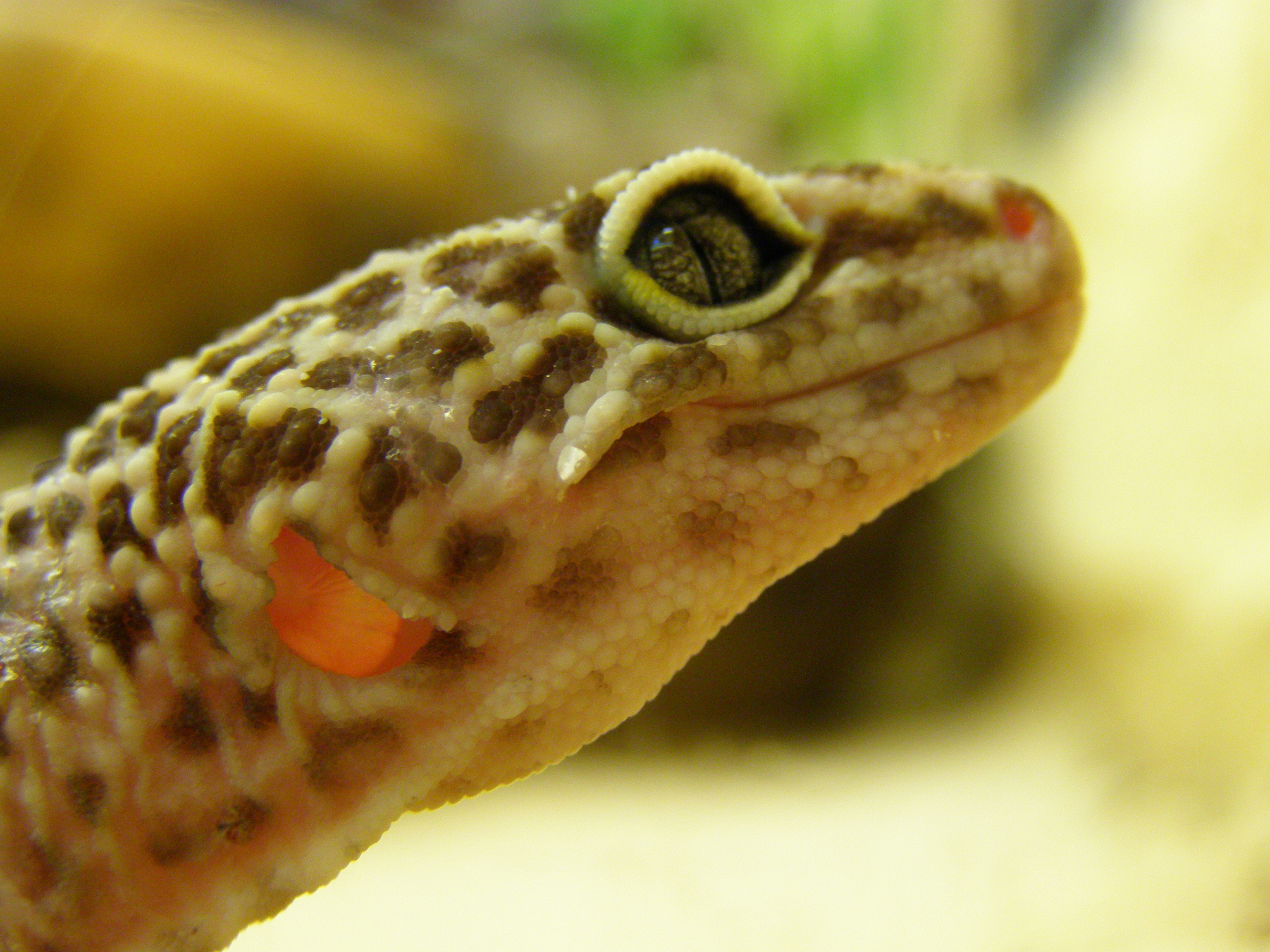 Réptil com tímpano laranja bastante visível